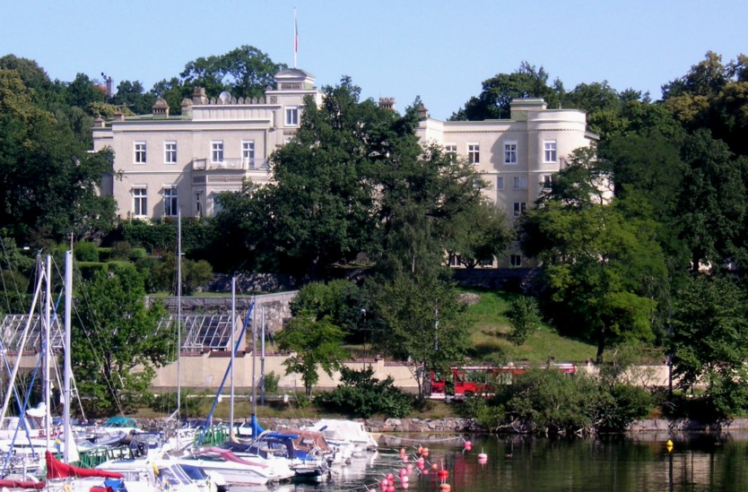 Oakhill på Södra Djurgården